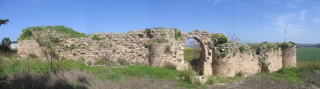 צילום פנורמי של מבצר כפרלט הצלבני שבמושב הבונים.צילמתי, גזרתי, הדבקתי והעלתי במרץ 2006.אסף.צ 12:49, 3 מרץ 2006 (UTC) The crusader fortress of Caferlet, HaBonim, Israel